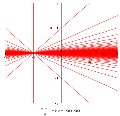 Фиксировав целое число k — значение выражения второго условия интегрируемости дифференциального бинома, получаем линию, проходящую через точку (-1,0), которой принадлежат точки (m,n), где m,n — рациональные числа, удовлетворяющие указанному условию. С увеличением k эти линии сгущаются около прямой n=0. Нарисовано в Maple.